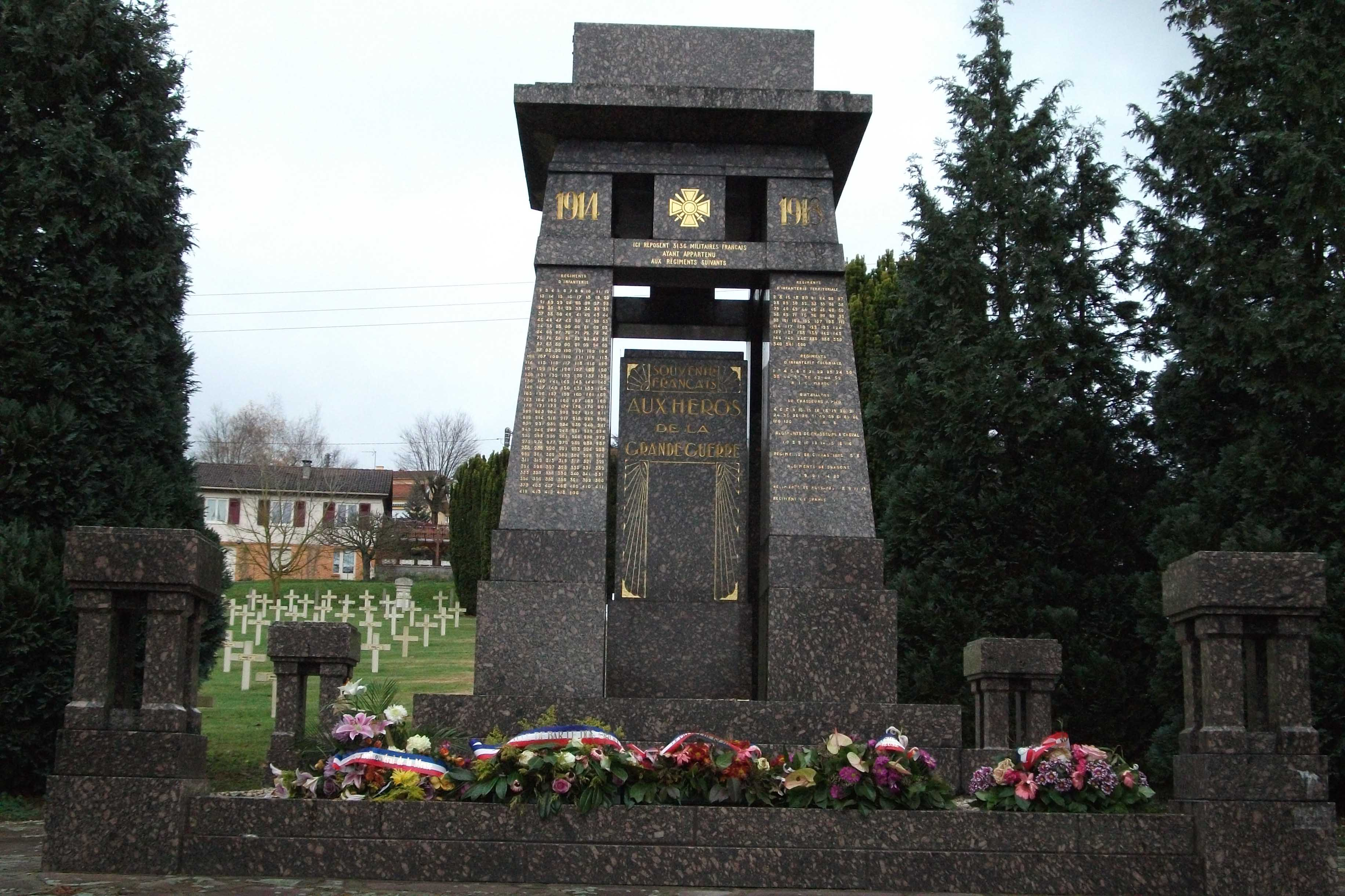 monument comprenant les noms des unités combattantes de la région inauguré le 16 octobre 1927 par Raymond Poincaré.